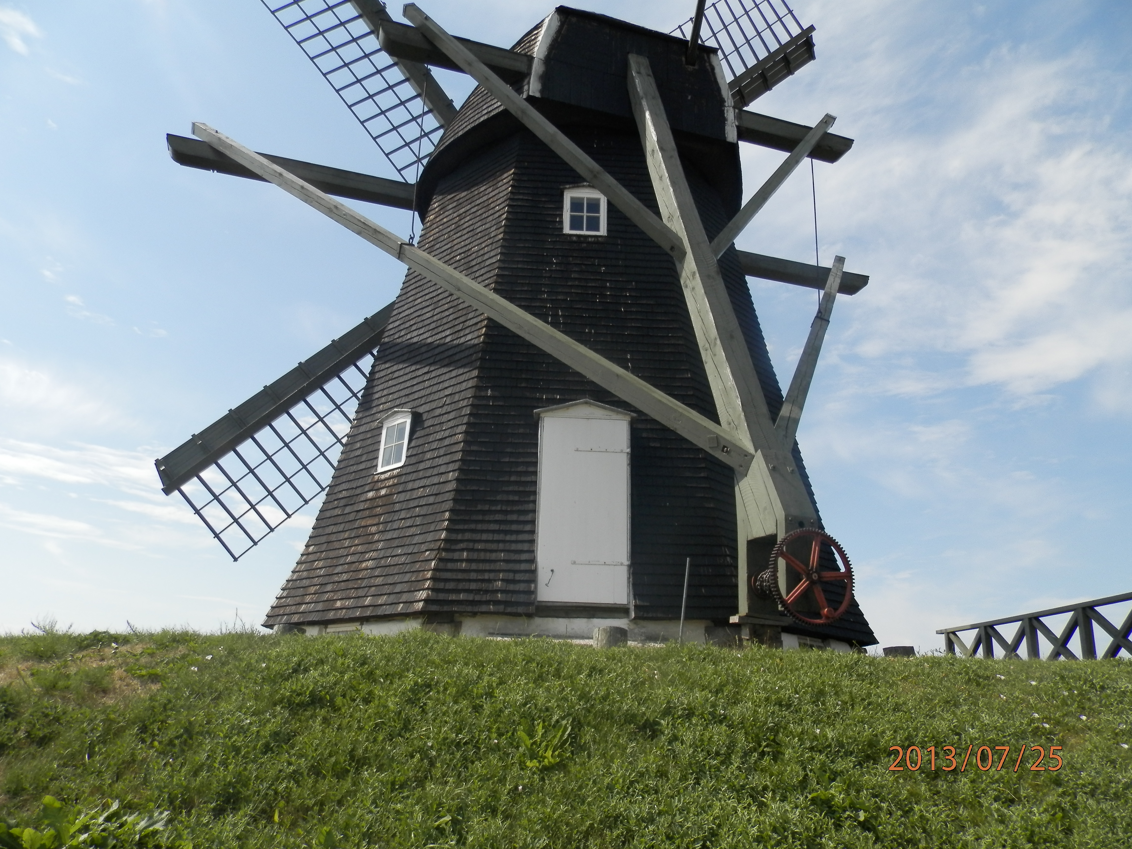 Vestervig Klostermølle, krøjeværket